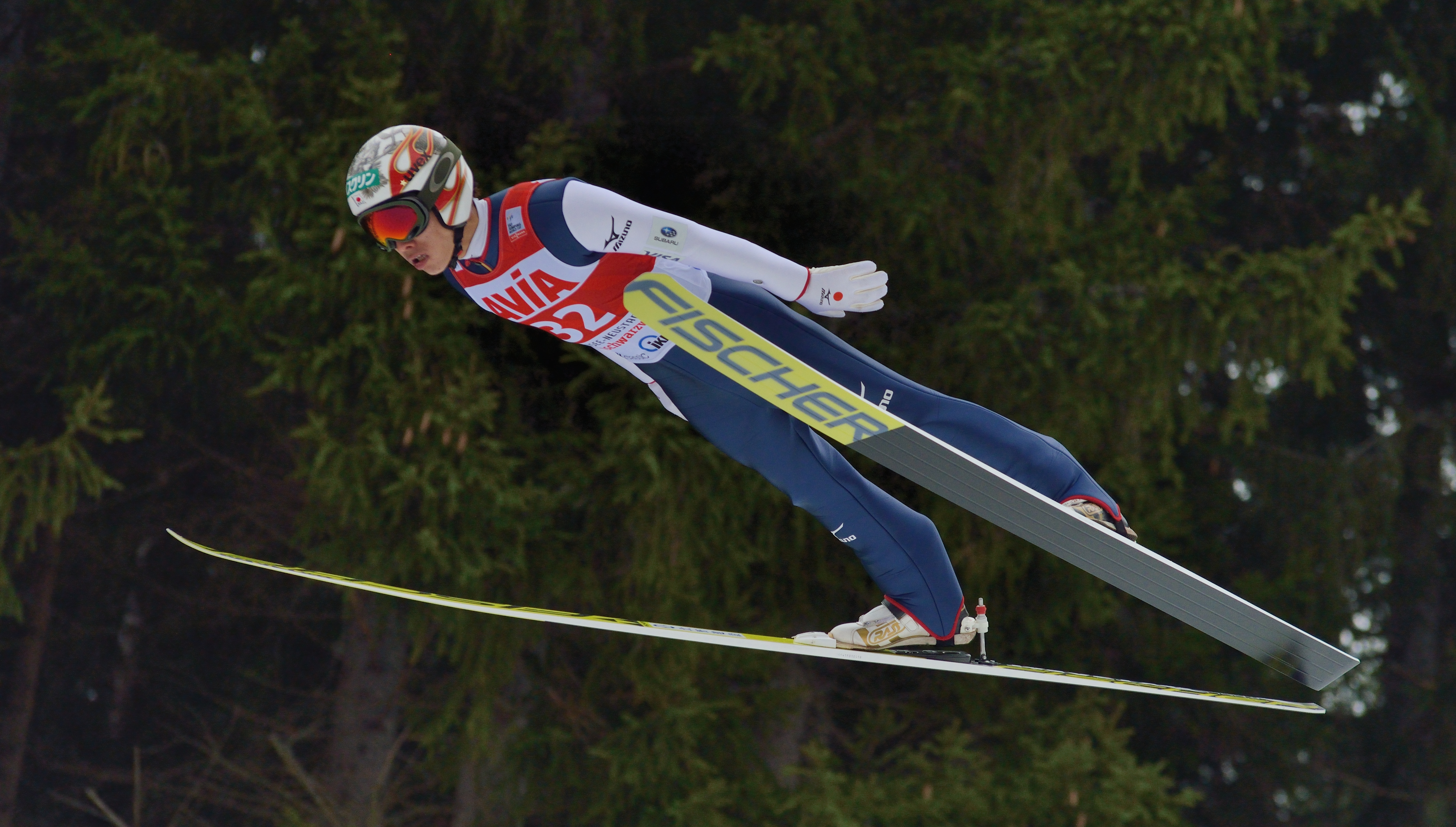 FIS Ski Weltcup Titisee-Neustadt 2016: Taku Takeuchi